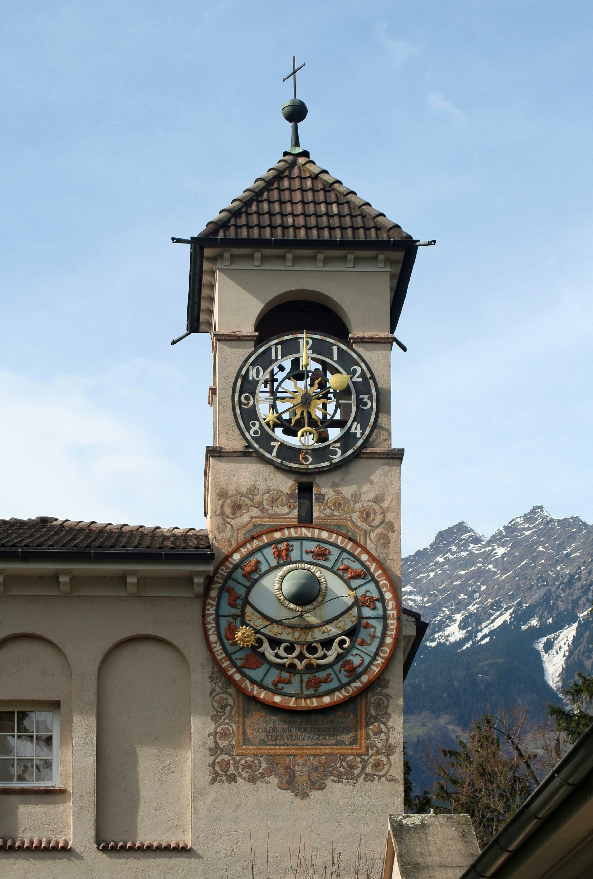 Meran Städtischer Friedhof Turmuhr